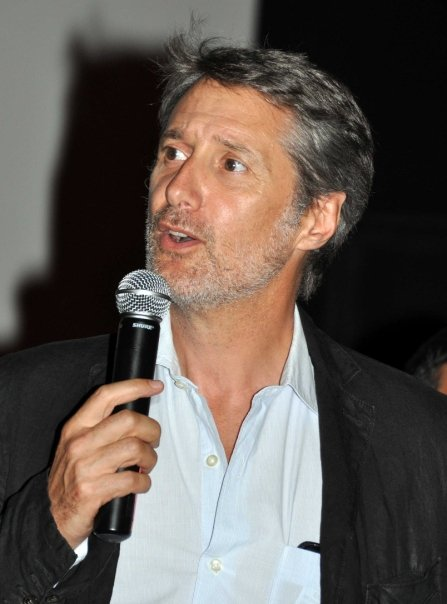 Antoine de Caunes à une projection du film "La folle histoire d'amour de Simon Eskenazy" de Jean-Jacques Zilbermann, au festival Paris cinéma